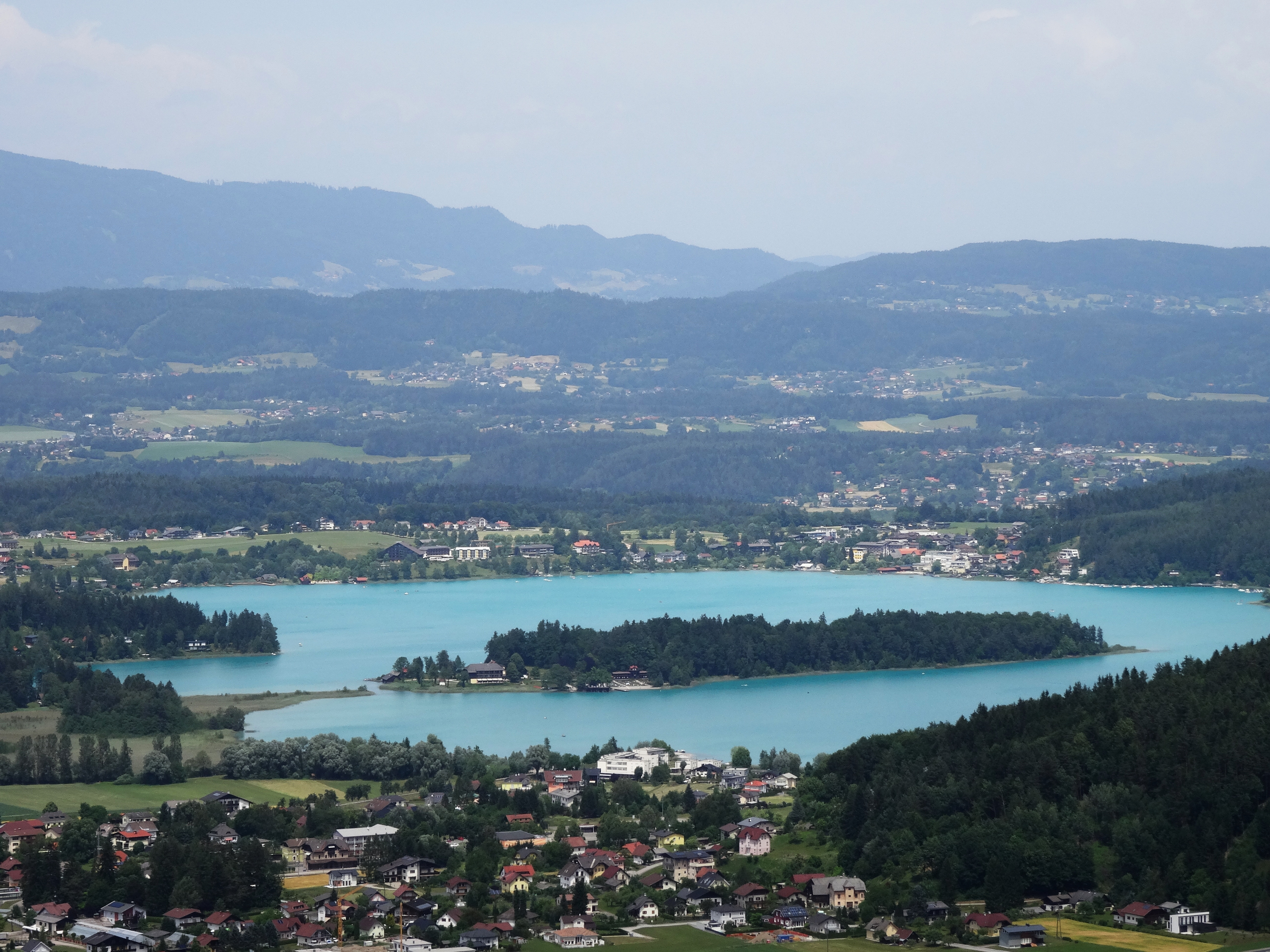 Faaker See (Kärnten, Österreich)